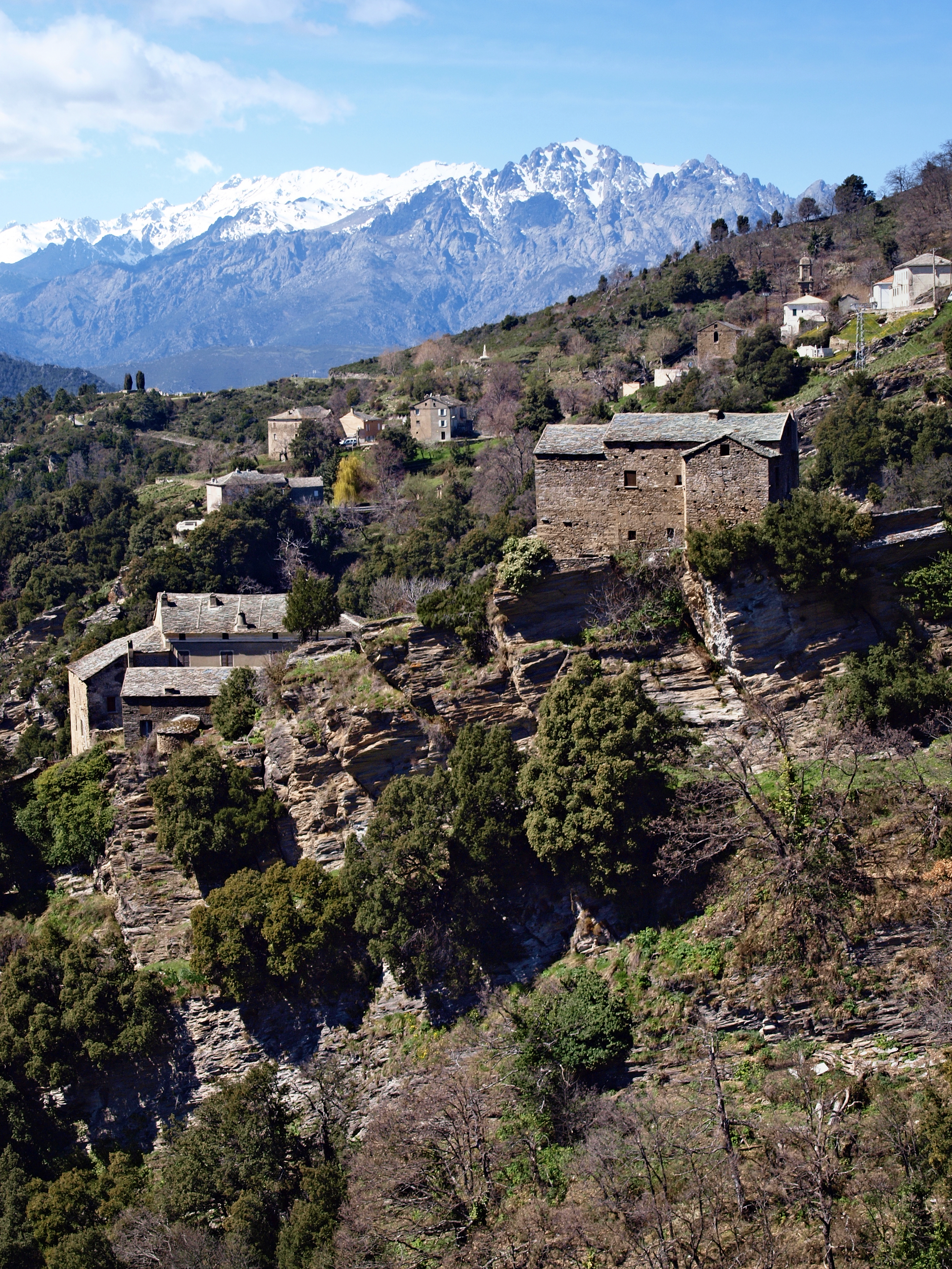 Morosaglia (Corsica) - Maison de L'Alpa - hameau de Terchini